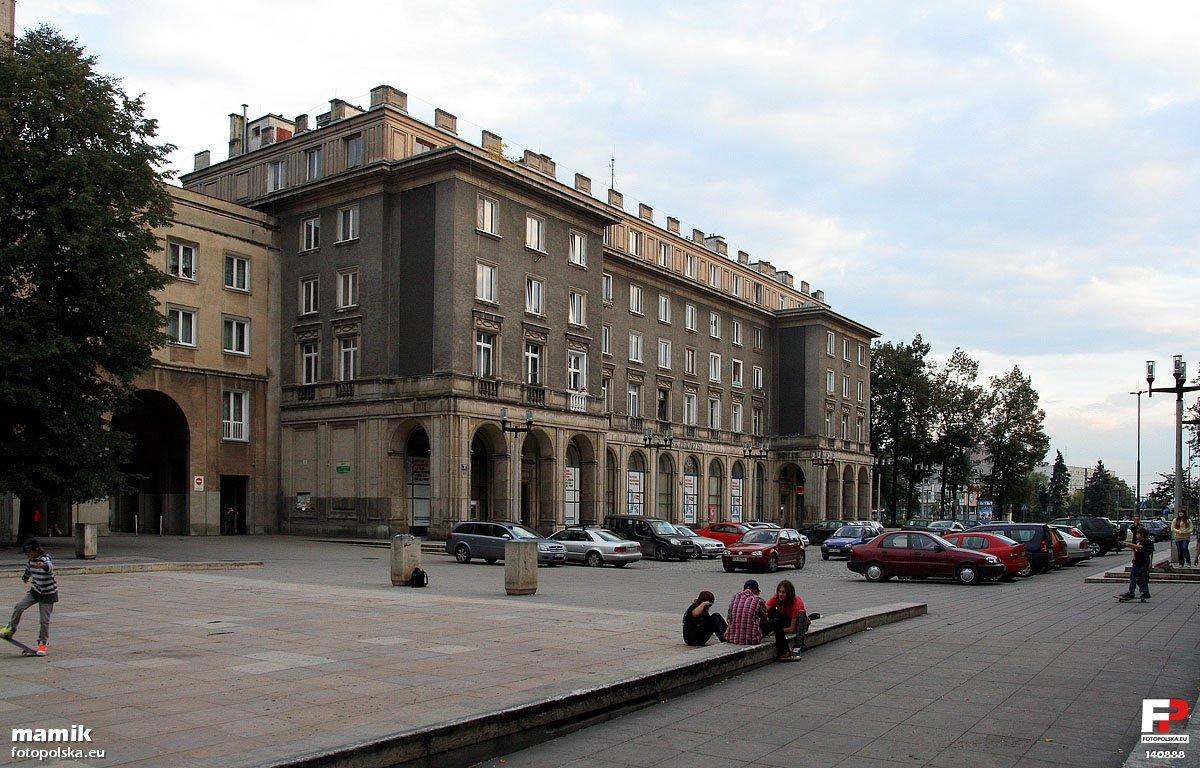 Aleja Róż, czyli właściwie główny plac Nowej Huty